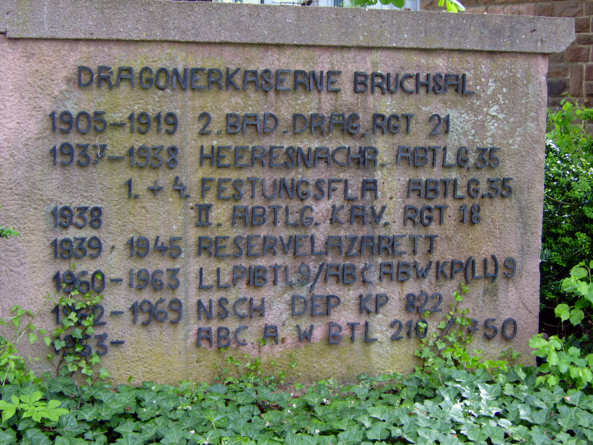 Gedenkstein für die in der Dragoner-Kaserne in D-76648 Bruchsal stationierten Verbände